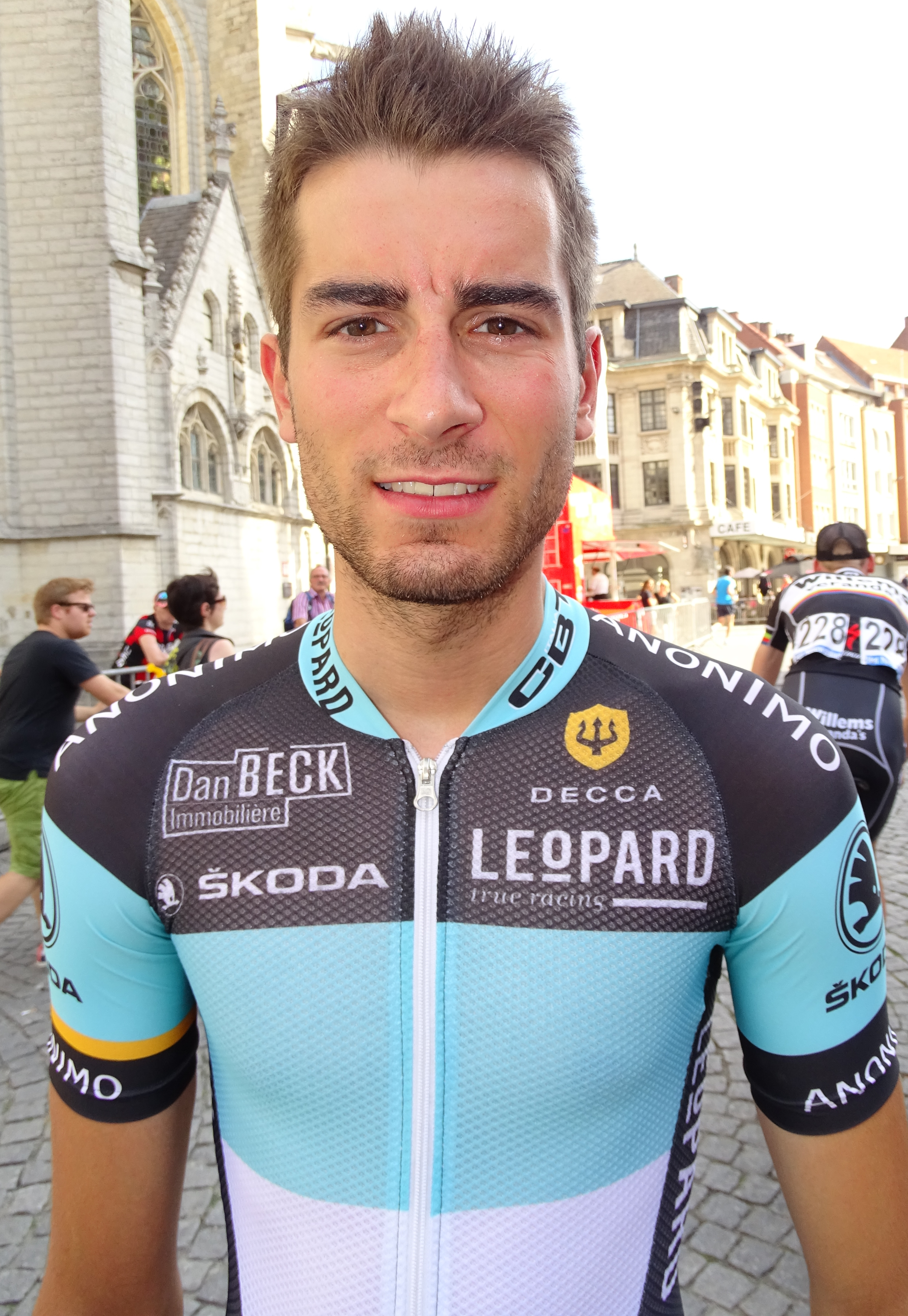 Reportage réalisé le dimanche 23 août à l'occasion du départ et de l'arrivée du Grand Prix Jef Scherens 2015 à Louvain, Belgique.